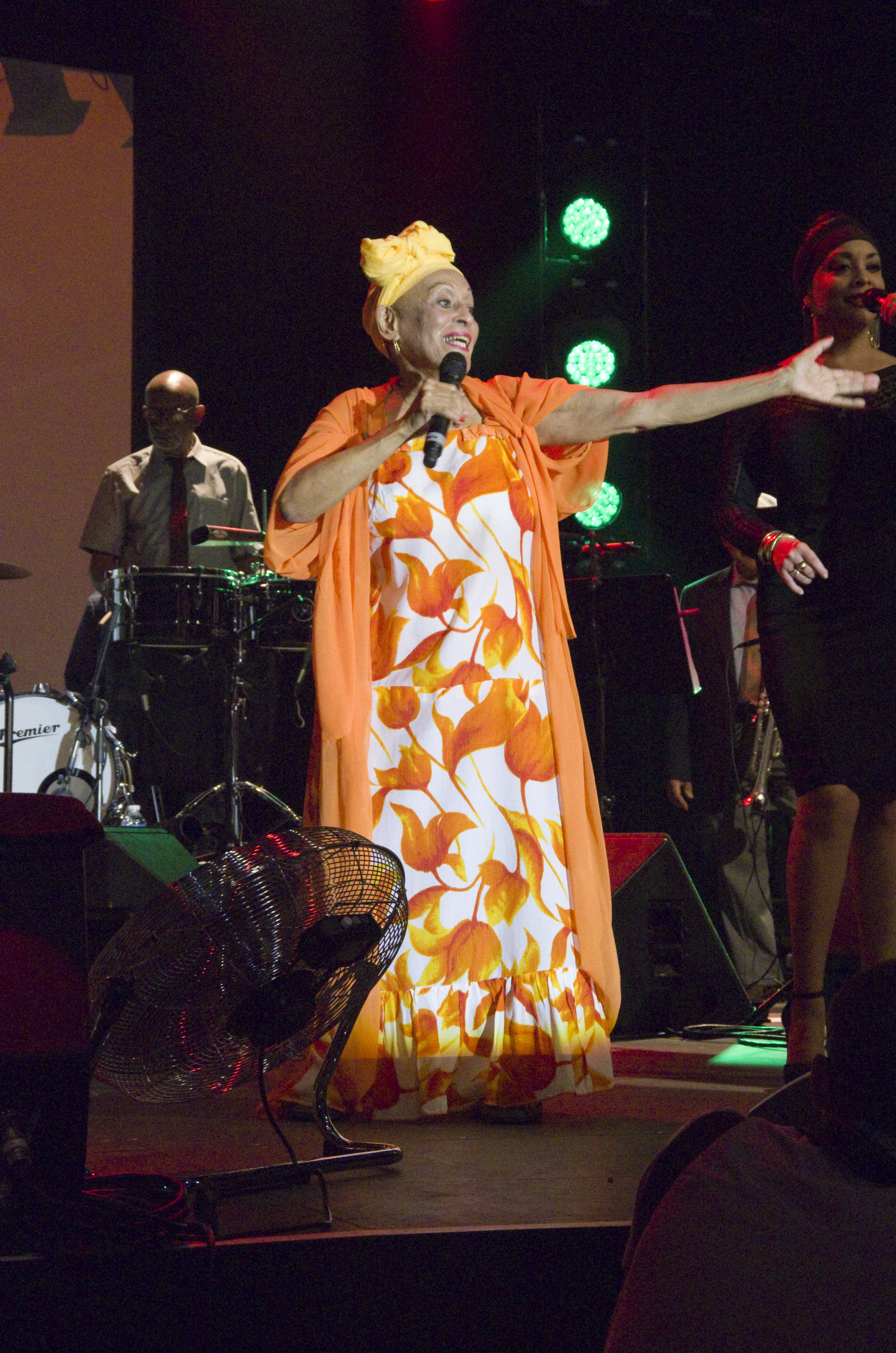 Das Zelt-Musik-Festival 2015 in Freiburg im Breisgau. 06.07.2015 Orquesta Buena Vista Social Club Omara Portuondo